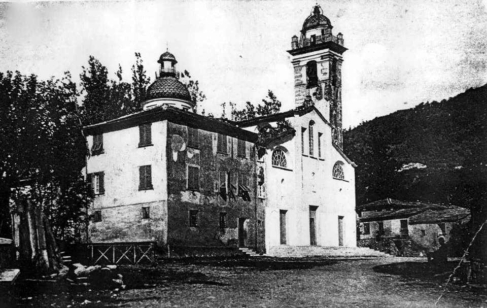 Immagine di fine Ottocento e inizio Novecento della chiesa parrocchiale di San Giovanni Battista, Cicagna, Liguria, Italia